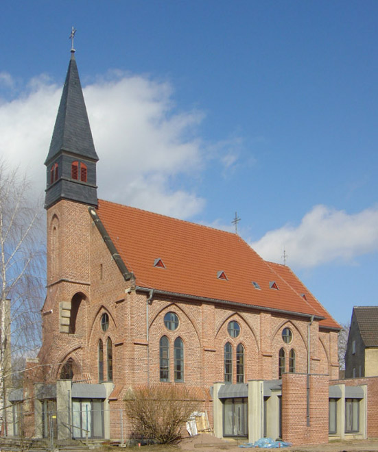 Die Katholische Kirche unbefleckte Empfängnis von Aussen. Dies ist die Katholische Kirche unbefleckte Empfängnis in Wittenberg